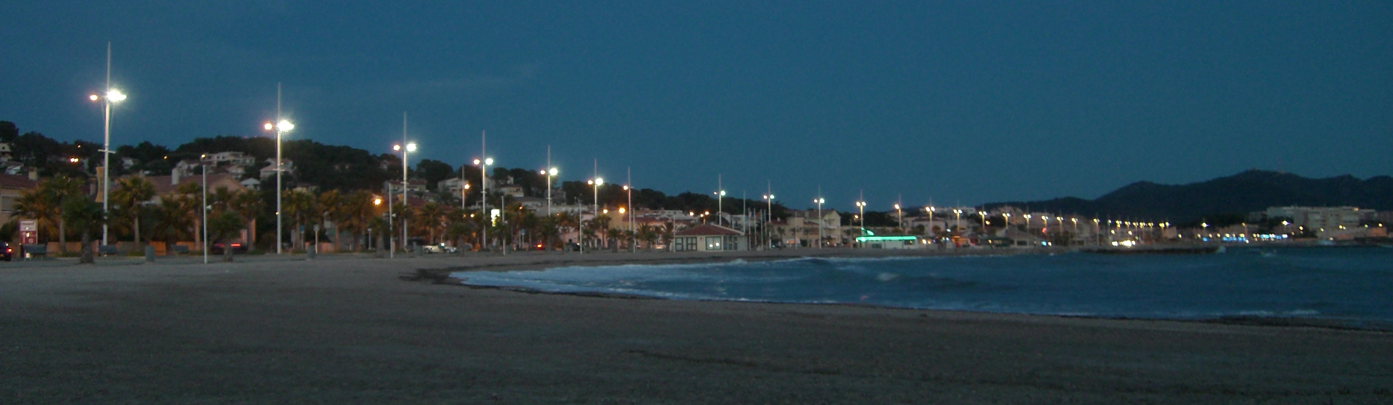 Evening in Six-Fours-les-Plages, France